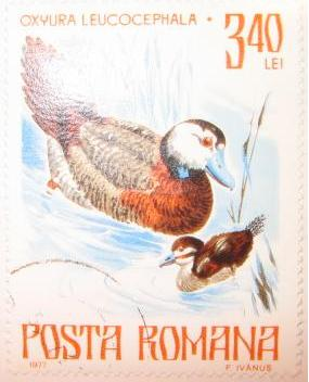 Posta Română